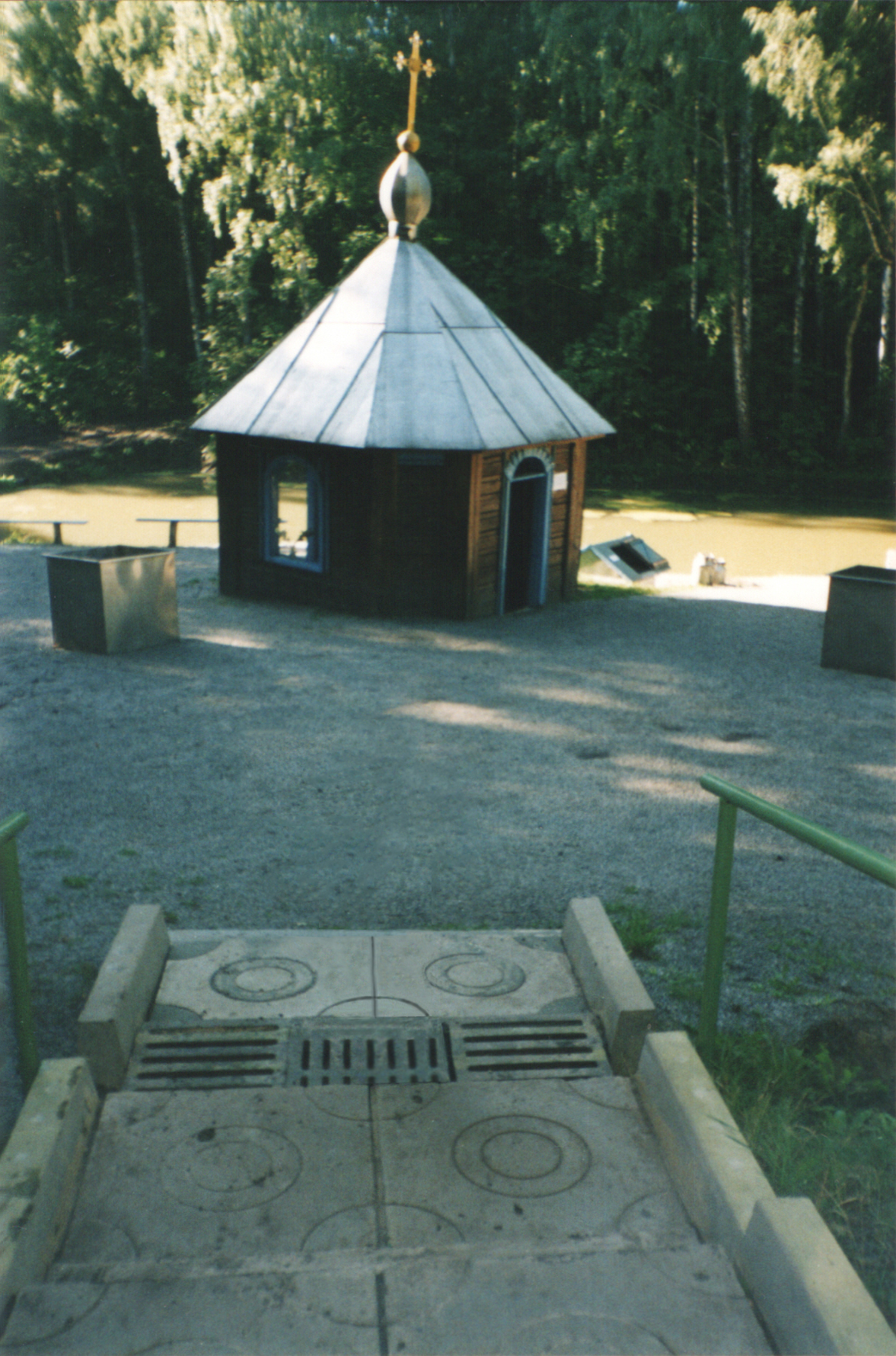 Источник св. вмч. и Целителя Пантелеймона: В 2 км к югу от с. Вязовое, в урочище Петровская дача, Вязовое, Прохоровский район, Белгородская область This image is related to the protected area of Russia number 3110387